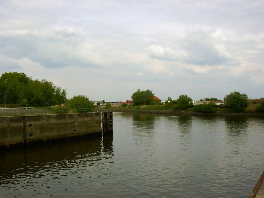 Dender river